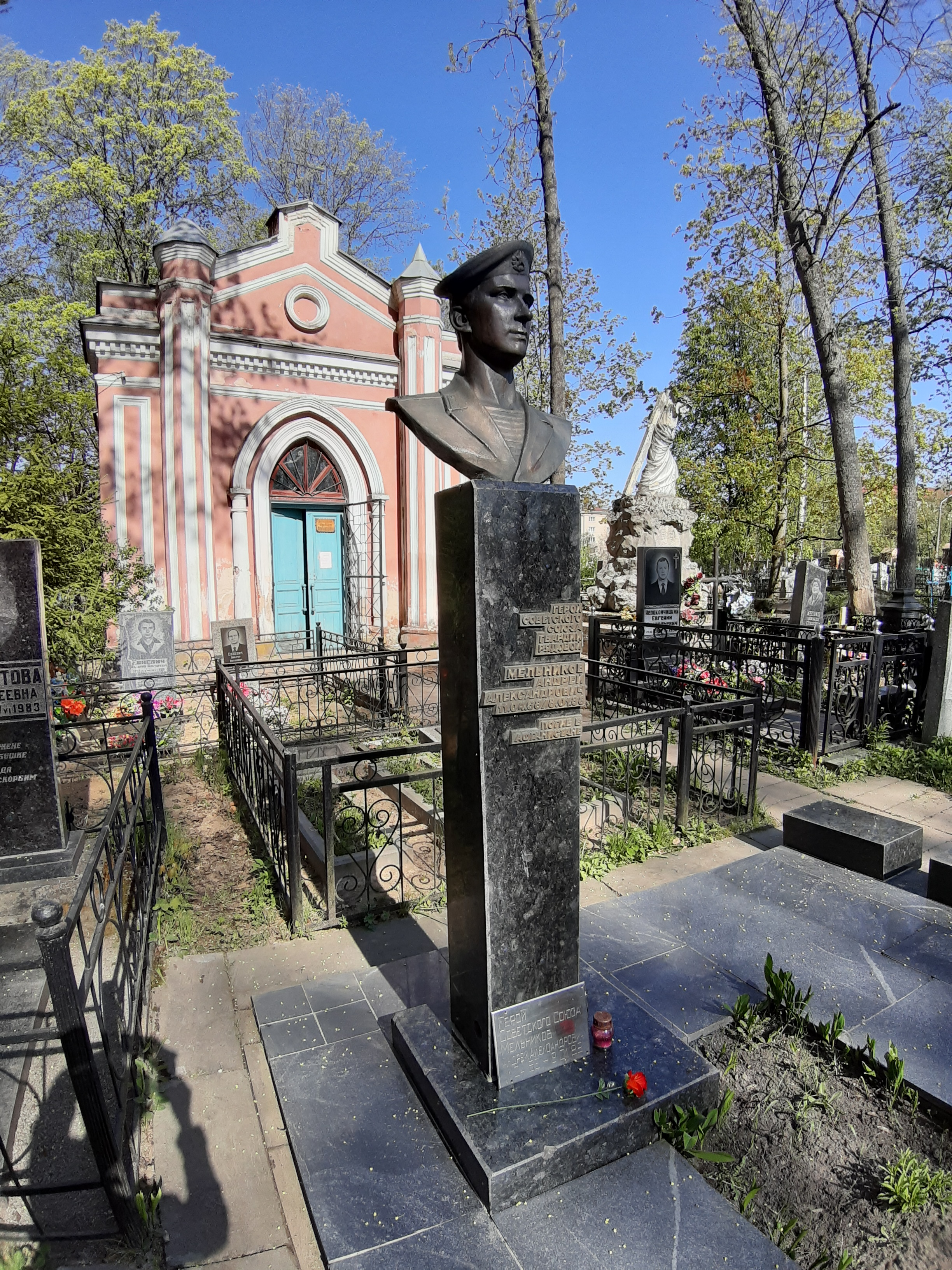 Магілёў. Польскі (Каталіцкія) могілкі